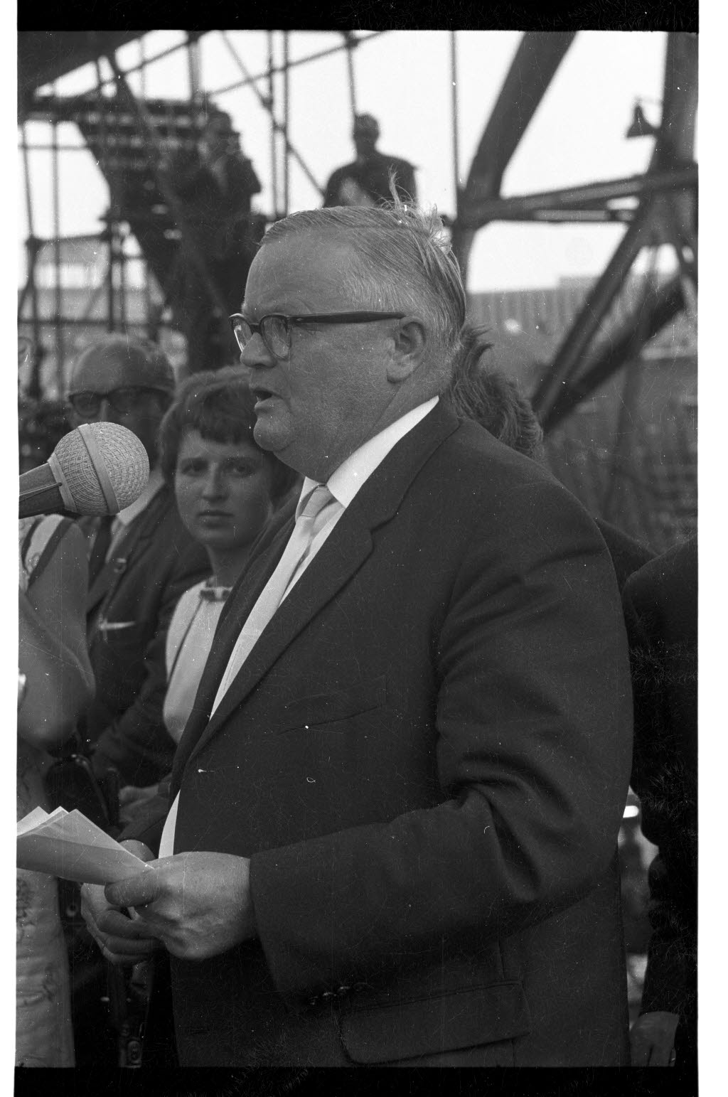 Stapellauf im Werk Dietrichsdorf der Howaldtswerke. Im Bild Landeswirtschaftsminister Hermann Böhrnsen am Mikrofon.